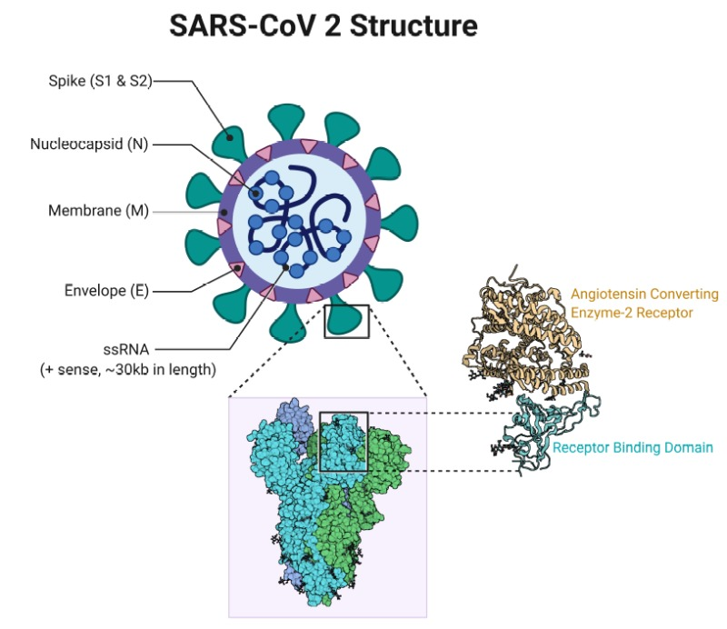 Struktura wirusa SARS-CoV-2